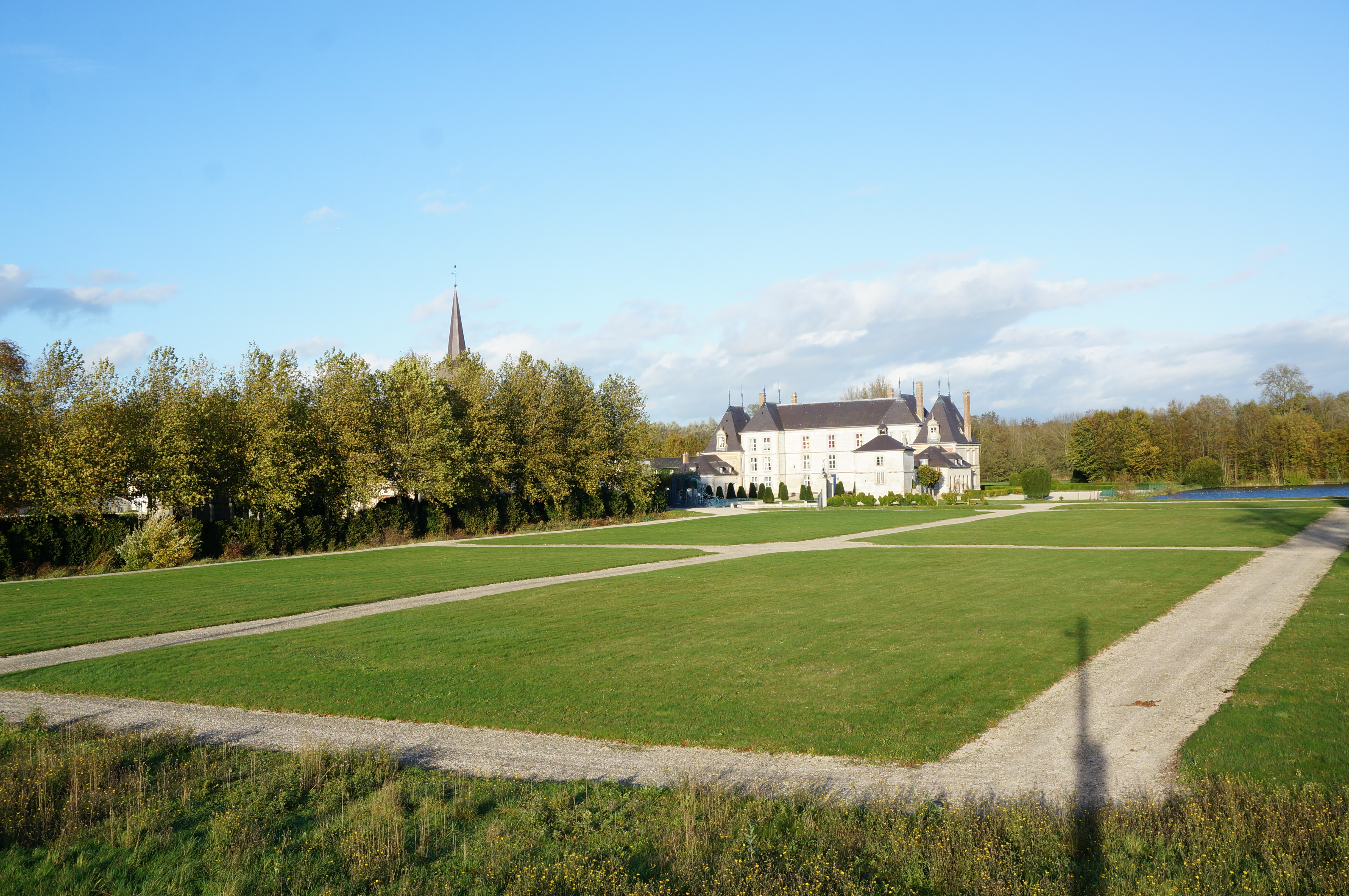 de Vitry.